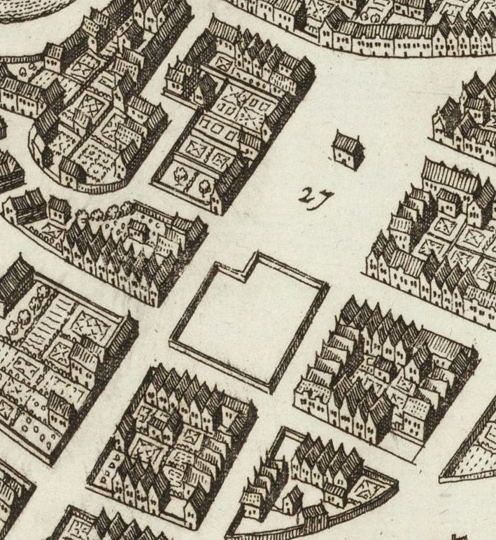 Ausschnitt Großneumarkt aus der Stadtansicht Hamburgum von Merian, Matthäus, (1593-1650), Frankfurt am Main 1653.